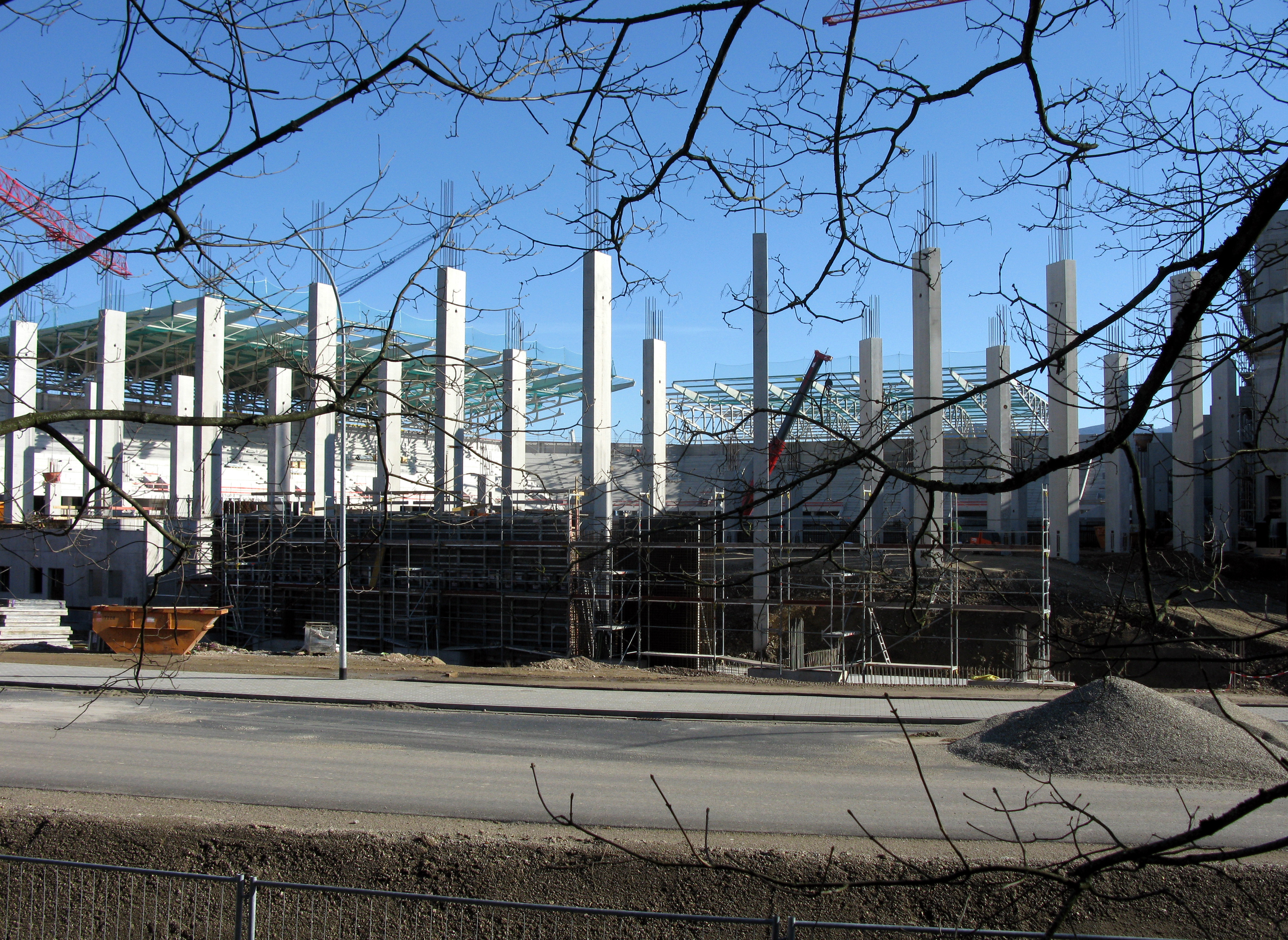 Baustelle des SC-Stadions am Freiburger Flugplatz